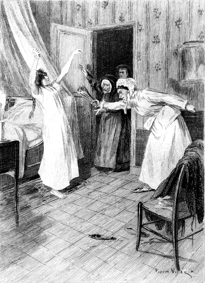 Illustration of Honoré de Balzac's Pierrette (1840): Pierrette Assaulted.